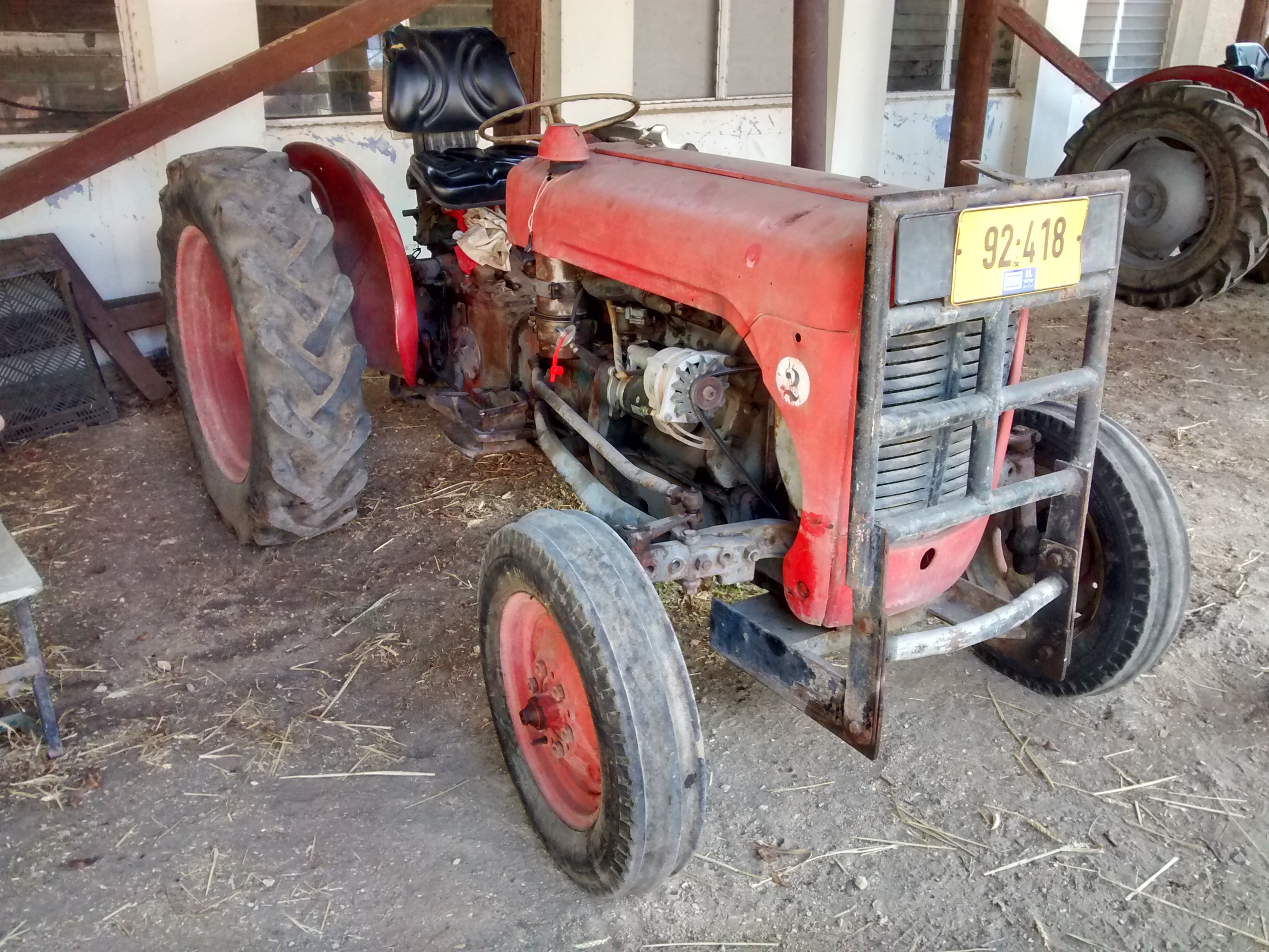 מוזיאון החצר הישנה עין שמר